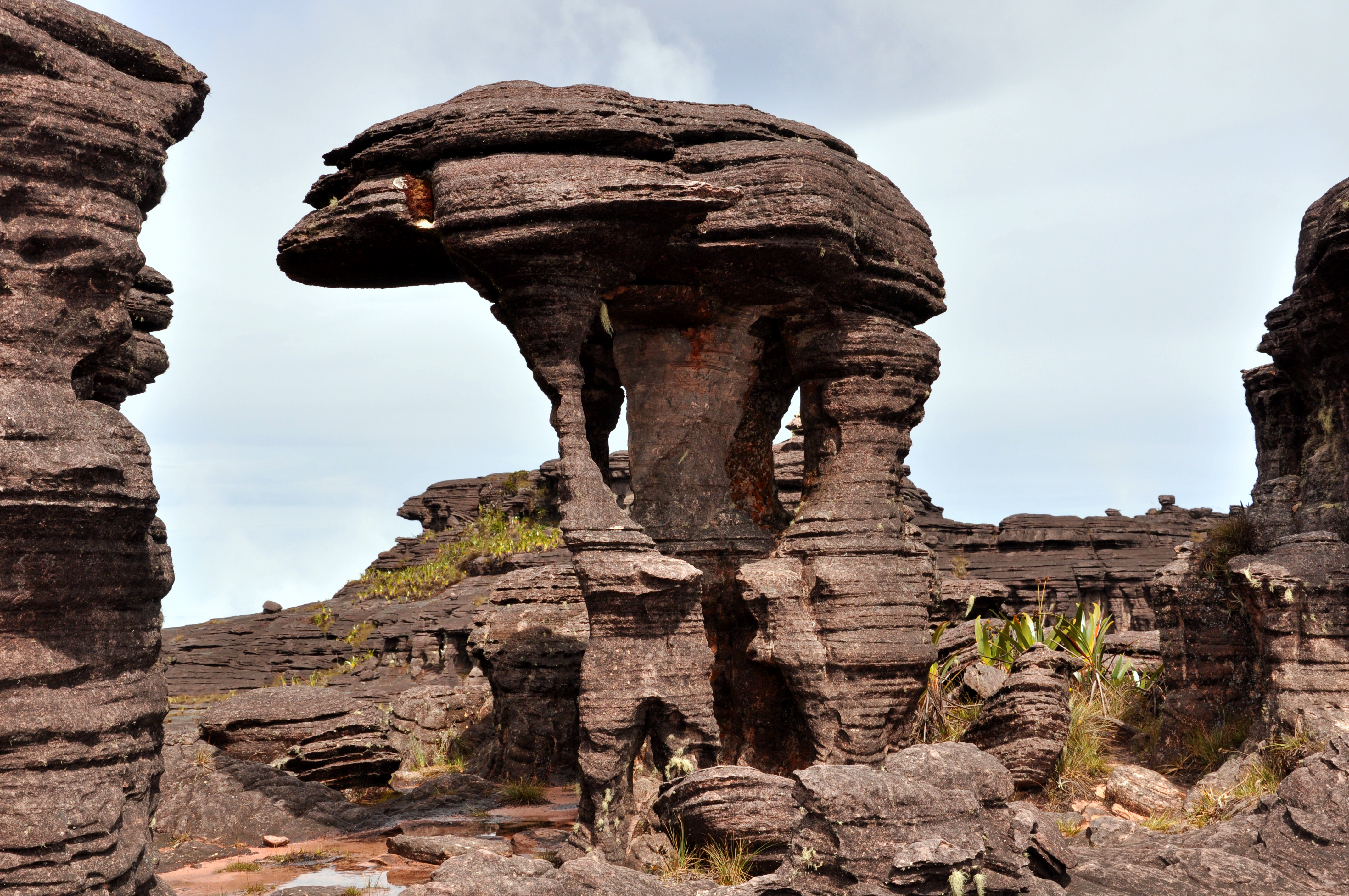 La formación rocosa, erosionada por el viento en la cima del tepuy Roraima, que tomó el nombre de "Elefante" por su forma.